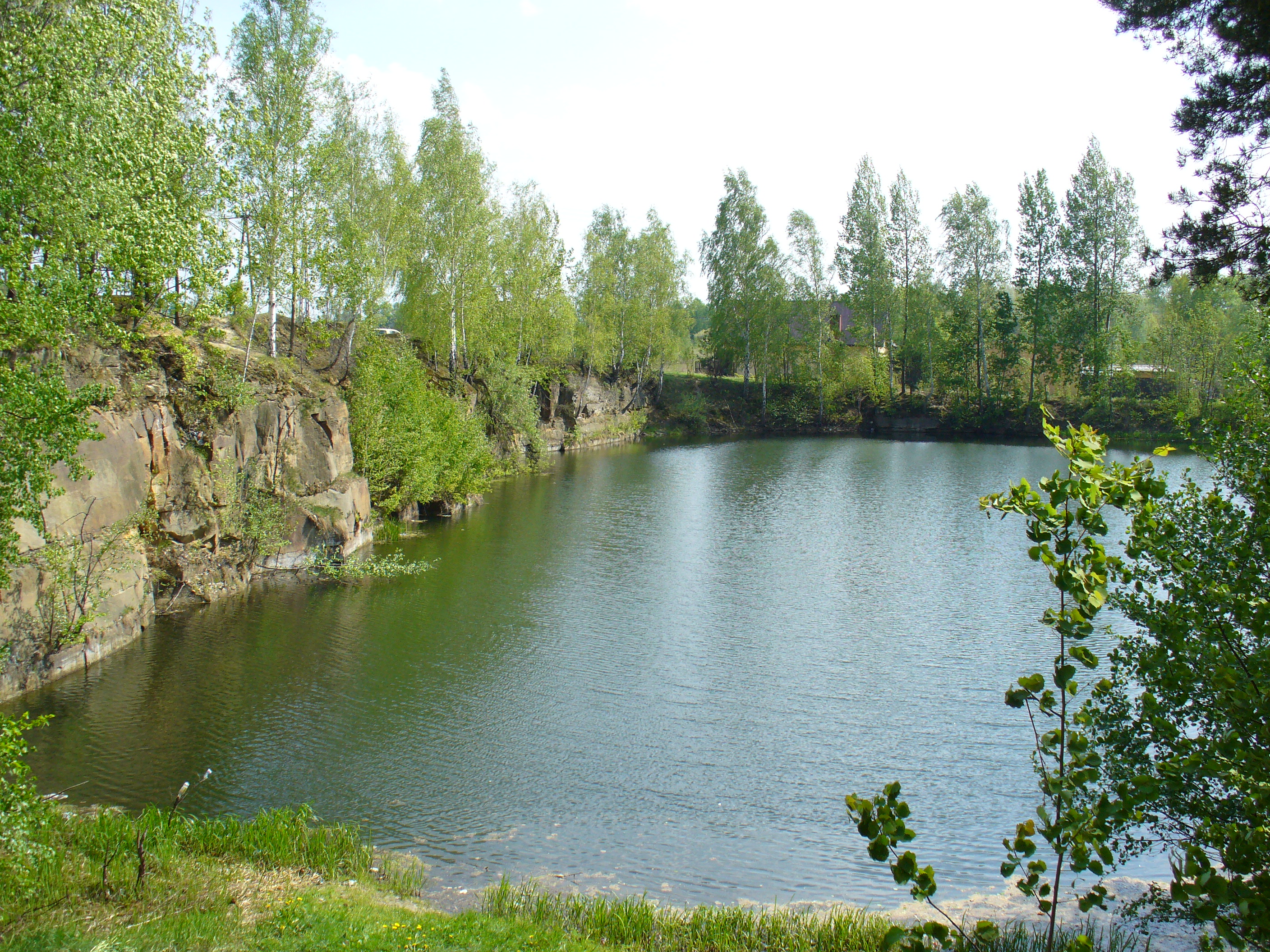 Old sandstone quarry in Szydłowiec near Radom, Poland.